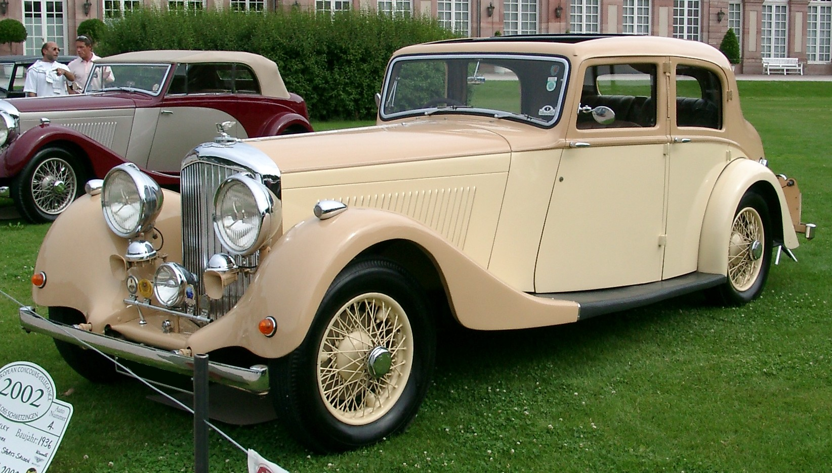 Bentley 4,25 Liter, Baujahr 1936. Fotografiert anläßlich des European Concours d'Elegance 2002 in Schwetzingen